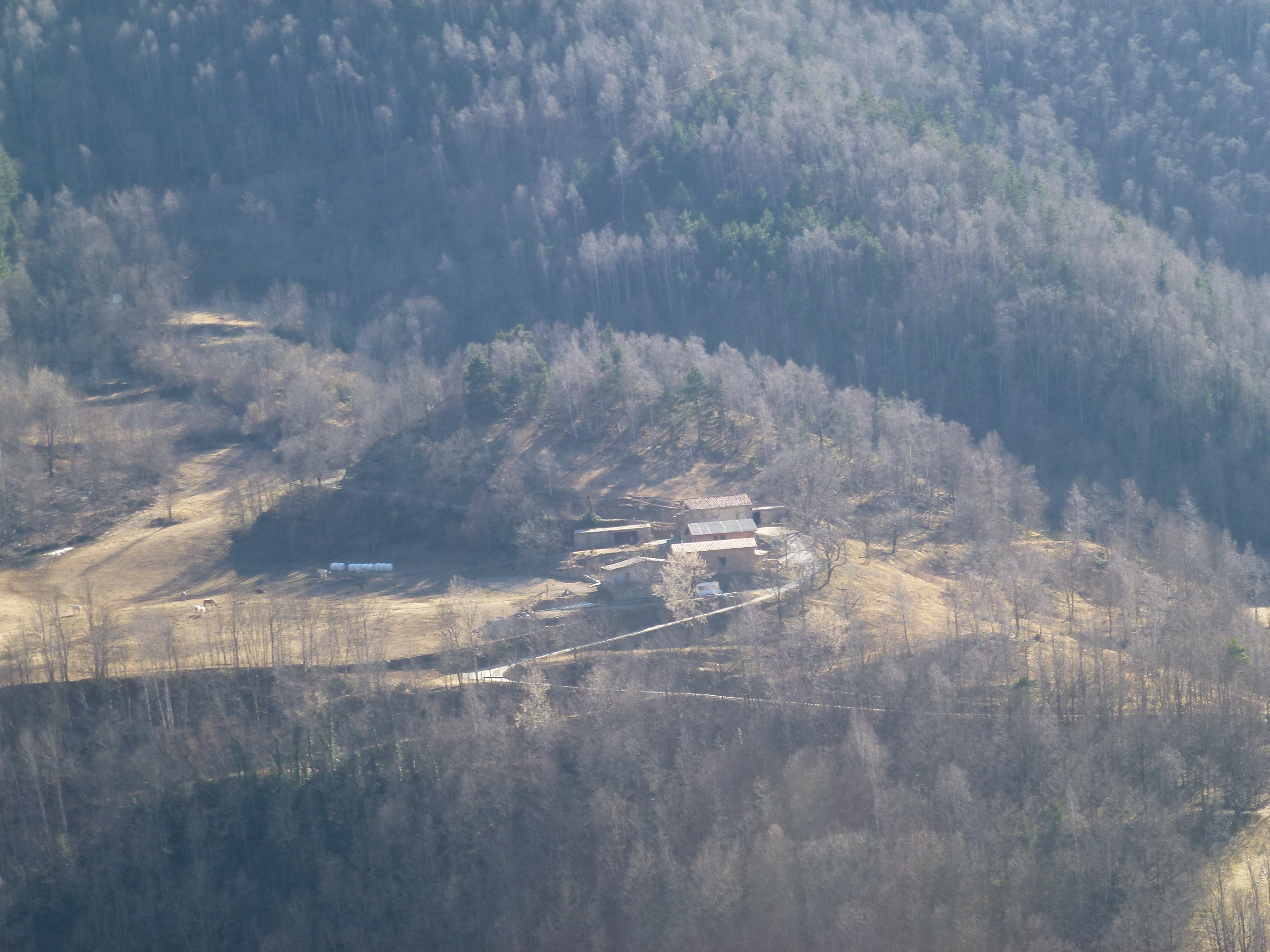 Can Barratort (Pardines)